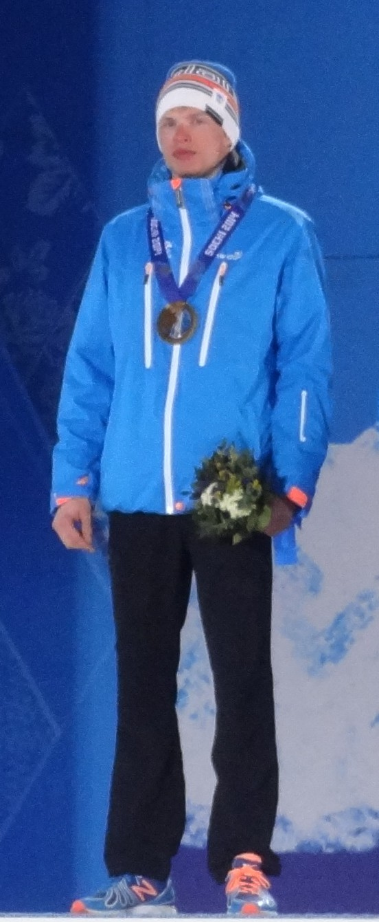 Iivo Niskanen